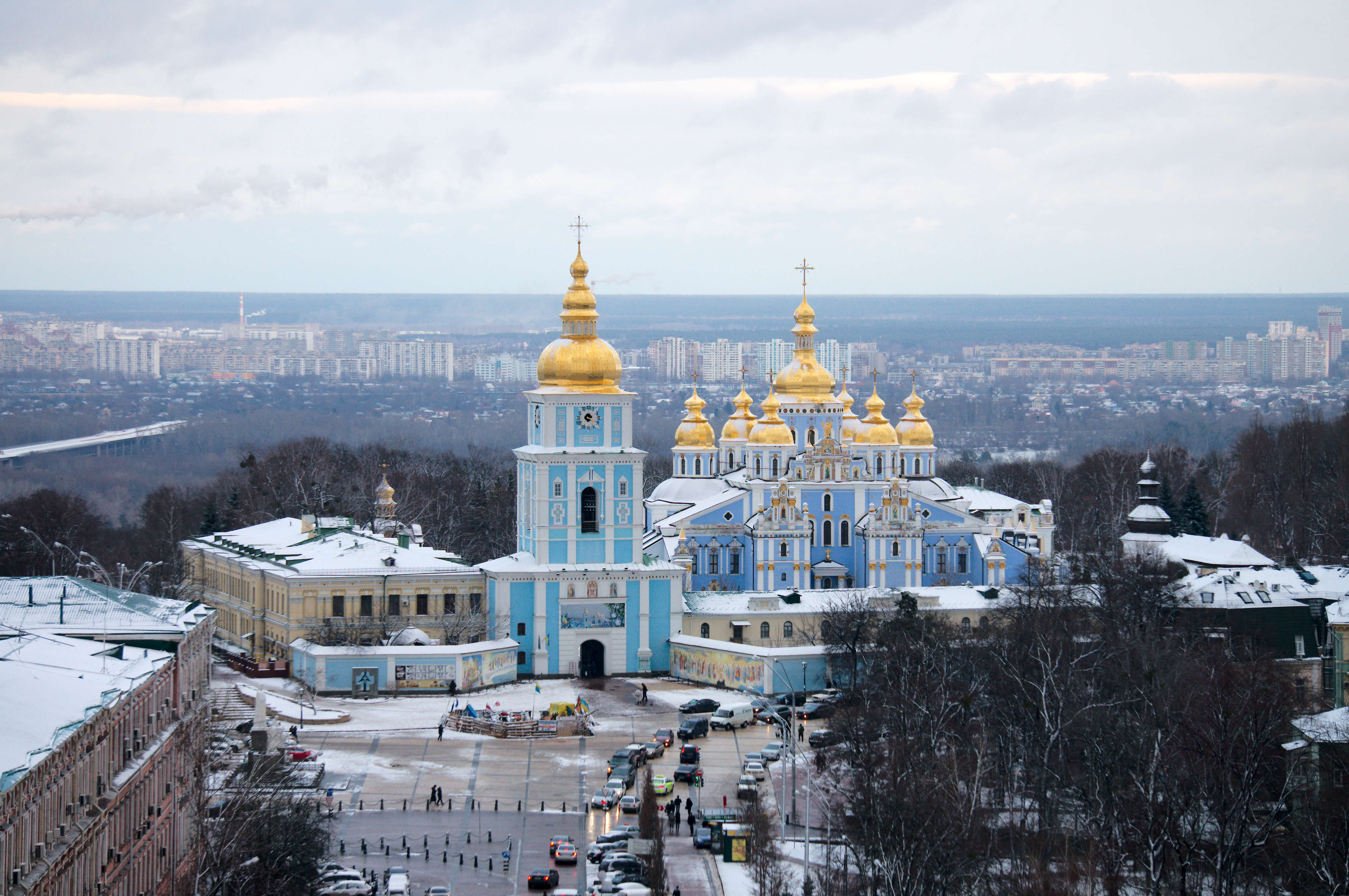 Euromaidan in Kiev